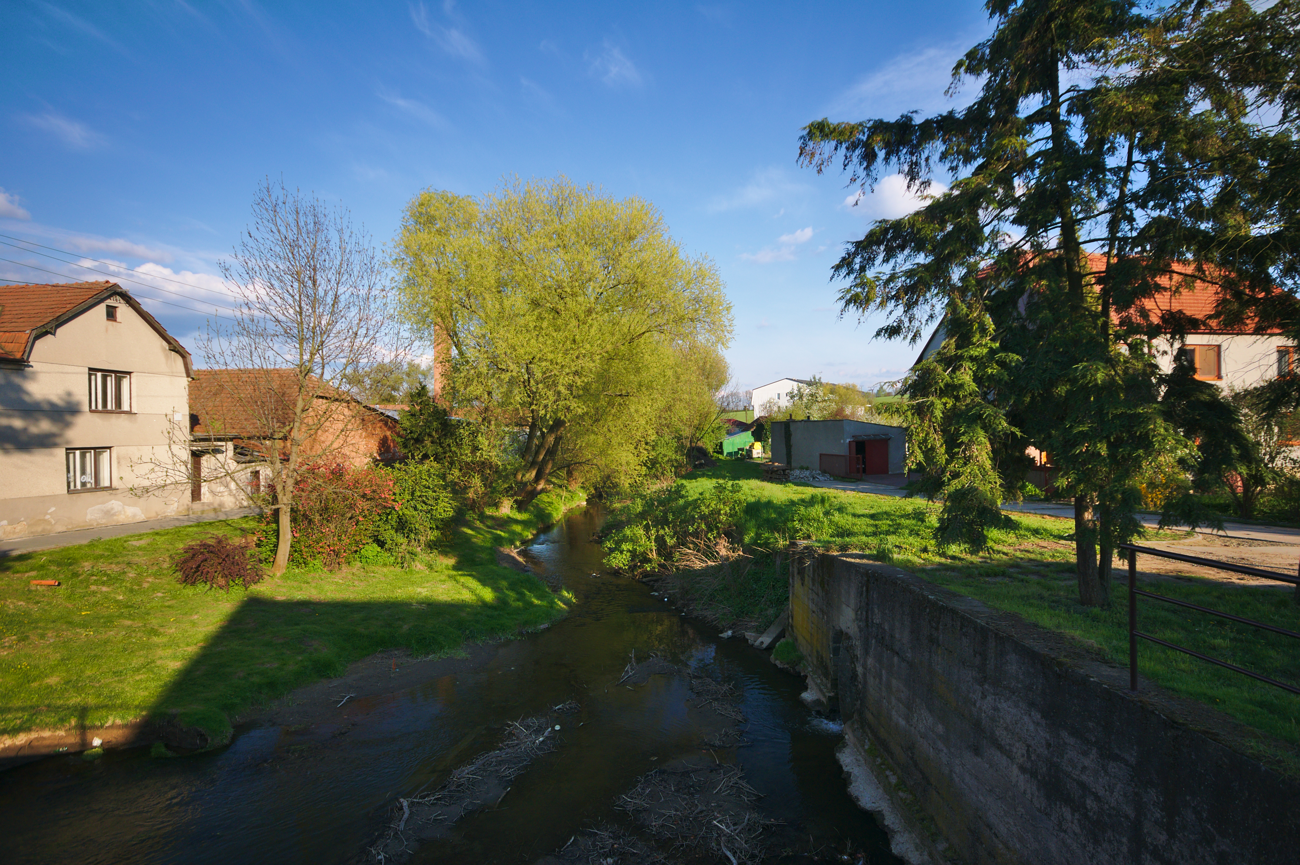 Brodečka, Brodek u Prostějova, okres Prostějov